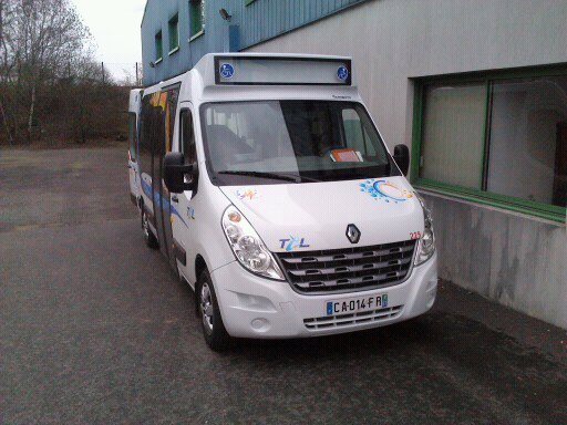 minibus TPMR du réseau STCL de Limoges